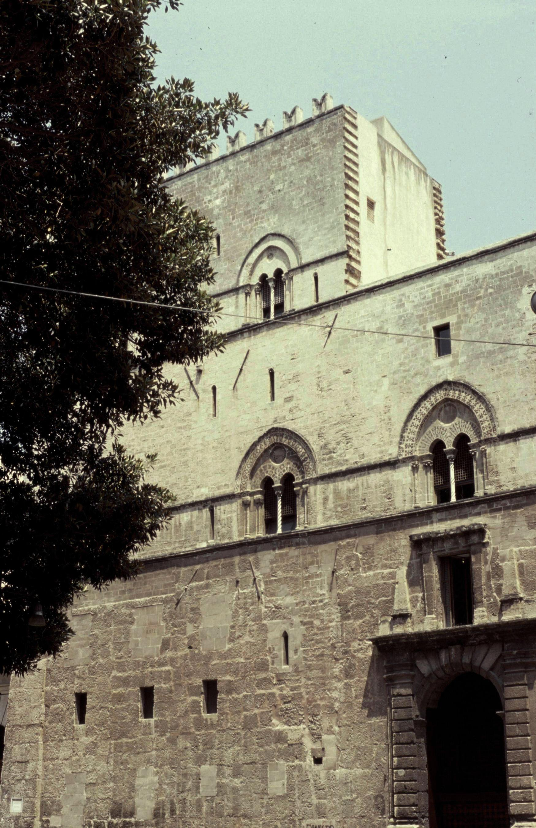 Sicile Palerme Palais Chiaramonte